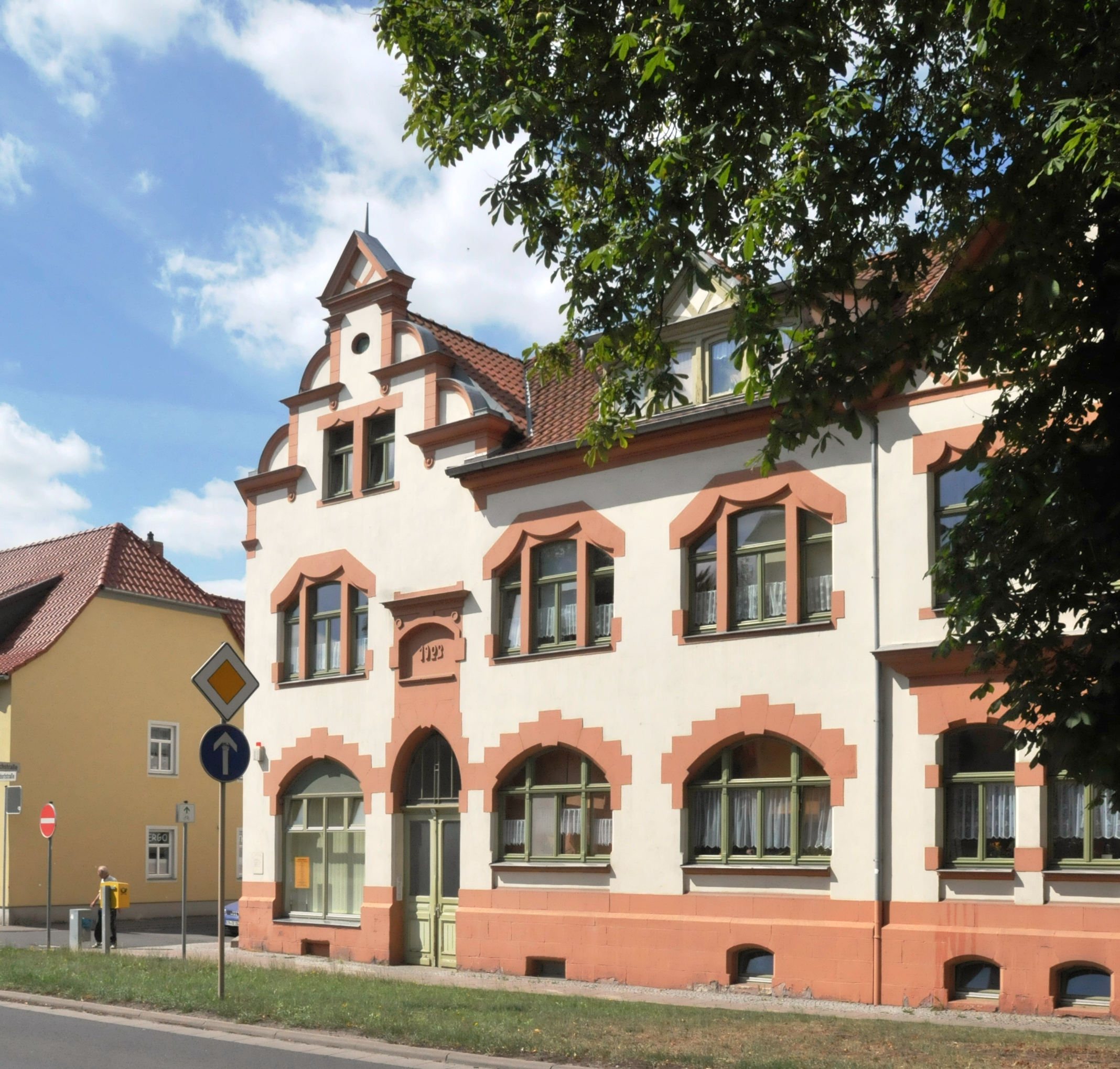 Neudietendorf, Brüderhaus, ehem. Chorhaus, im August 2016